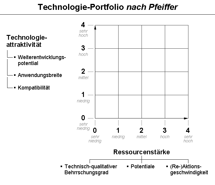 Technologie-Portfolio (TPF) nach Pfeiffer - Indikatorenstruktur, vgl. Das Technologie-Portfolio-Konzept zur Beherrschung der Schnittstelle Technik und Unternehmensstrategie, in: Hahn, D.; Taylor, B. (Hrsg.); Strategische Unternehmensplanung. Stand und Entwicklung. 4. Auflage, Heidelberg, Wien 1986, S. 149-177